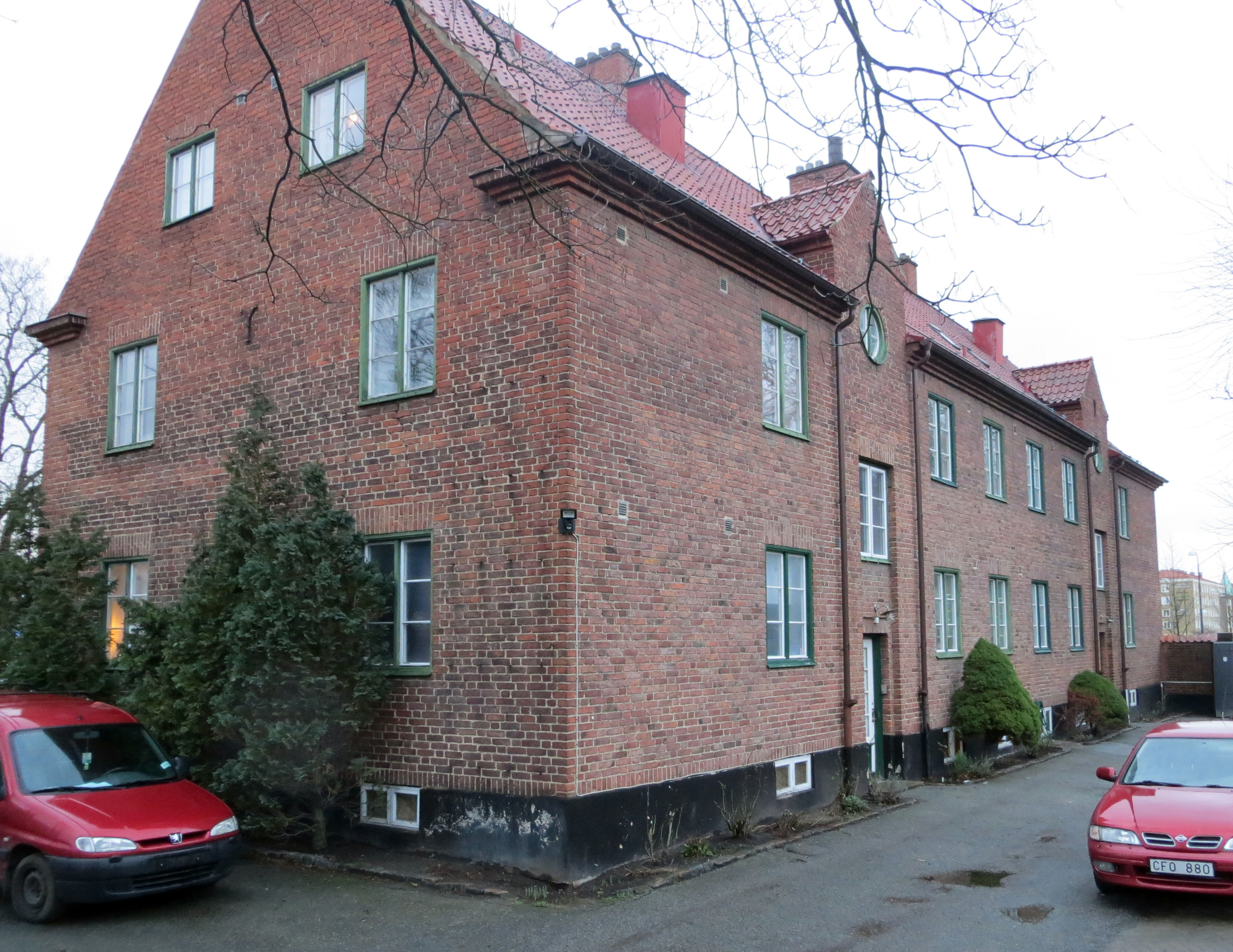 Gersoniska stiftelsens hus från 1929 i Malmö.